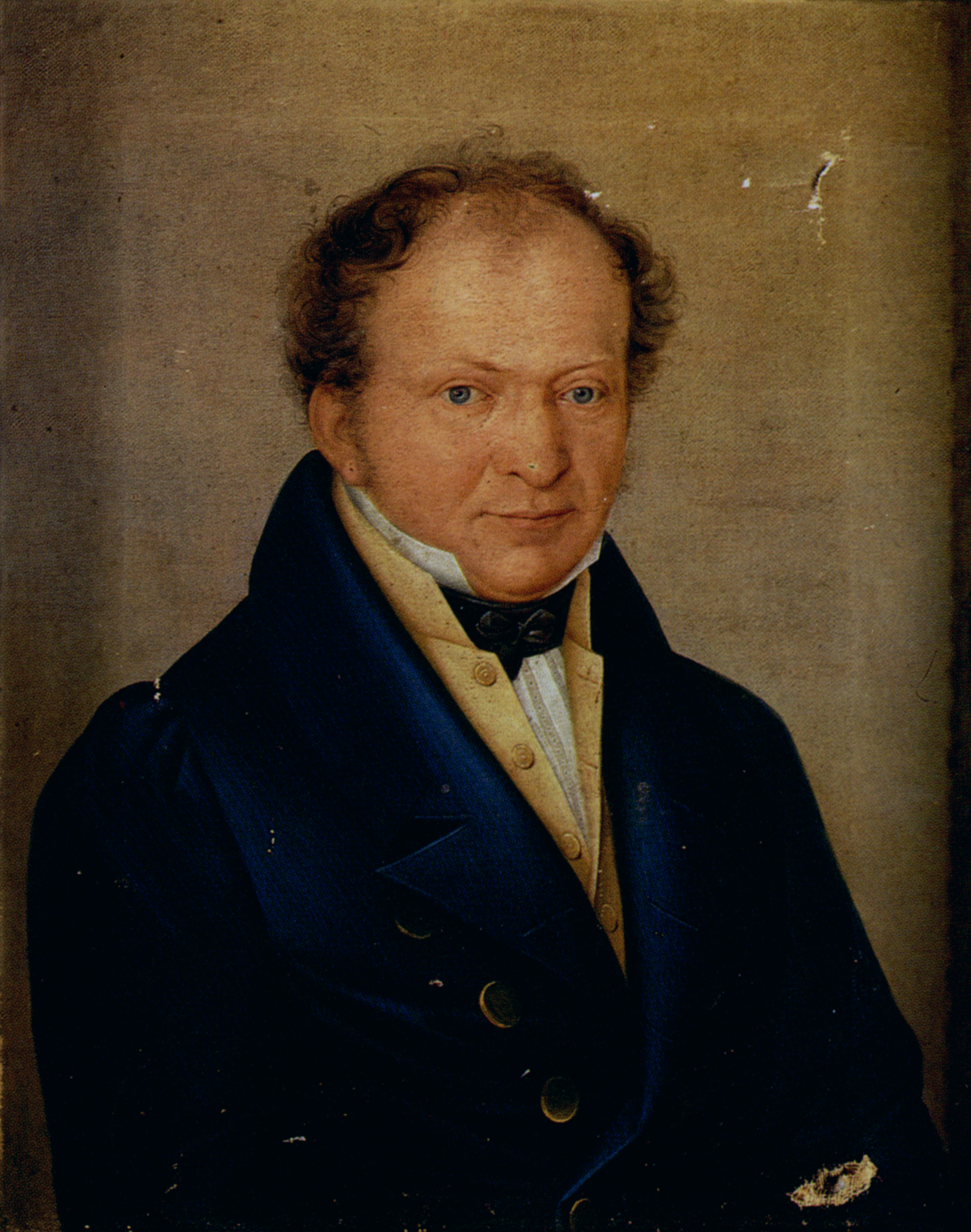 Ulrich Christoph Gradmann, Kaufmann in Ravensburg; Gemälde von Nikolaus Drexel; Privatbesitz